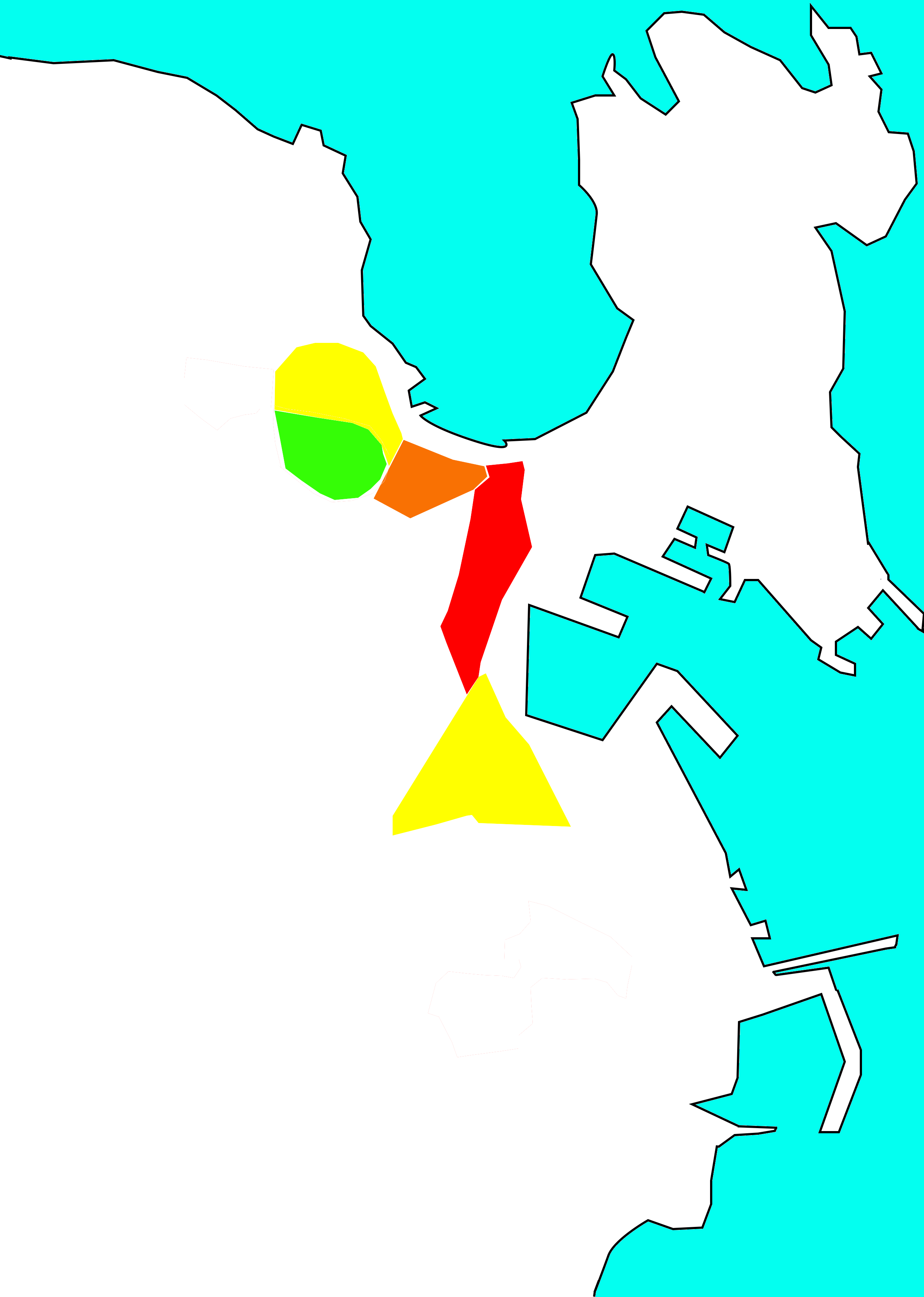 Situación do Primeiro Ensanche (vermello) e o Ensanche de Riazor (laranxa) no concello da Coruña, segundo En amarelo, áreas previstas no segundo Ensanche e en verde, a Cidade Xardín.